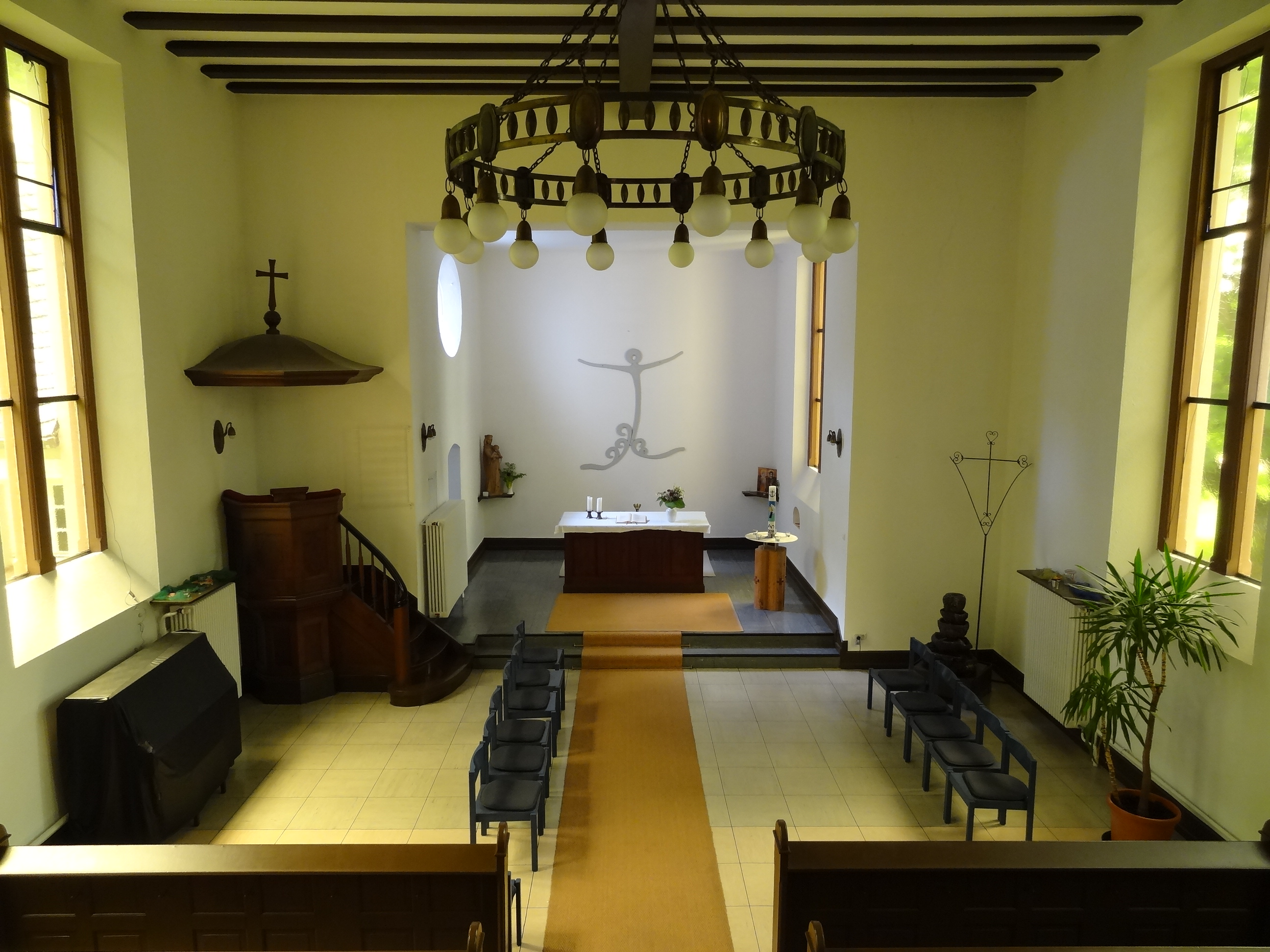 Kapelle in den VITOS-Kliniken für Psychiatrie